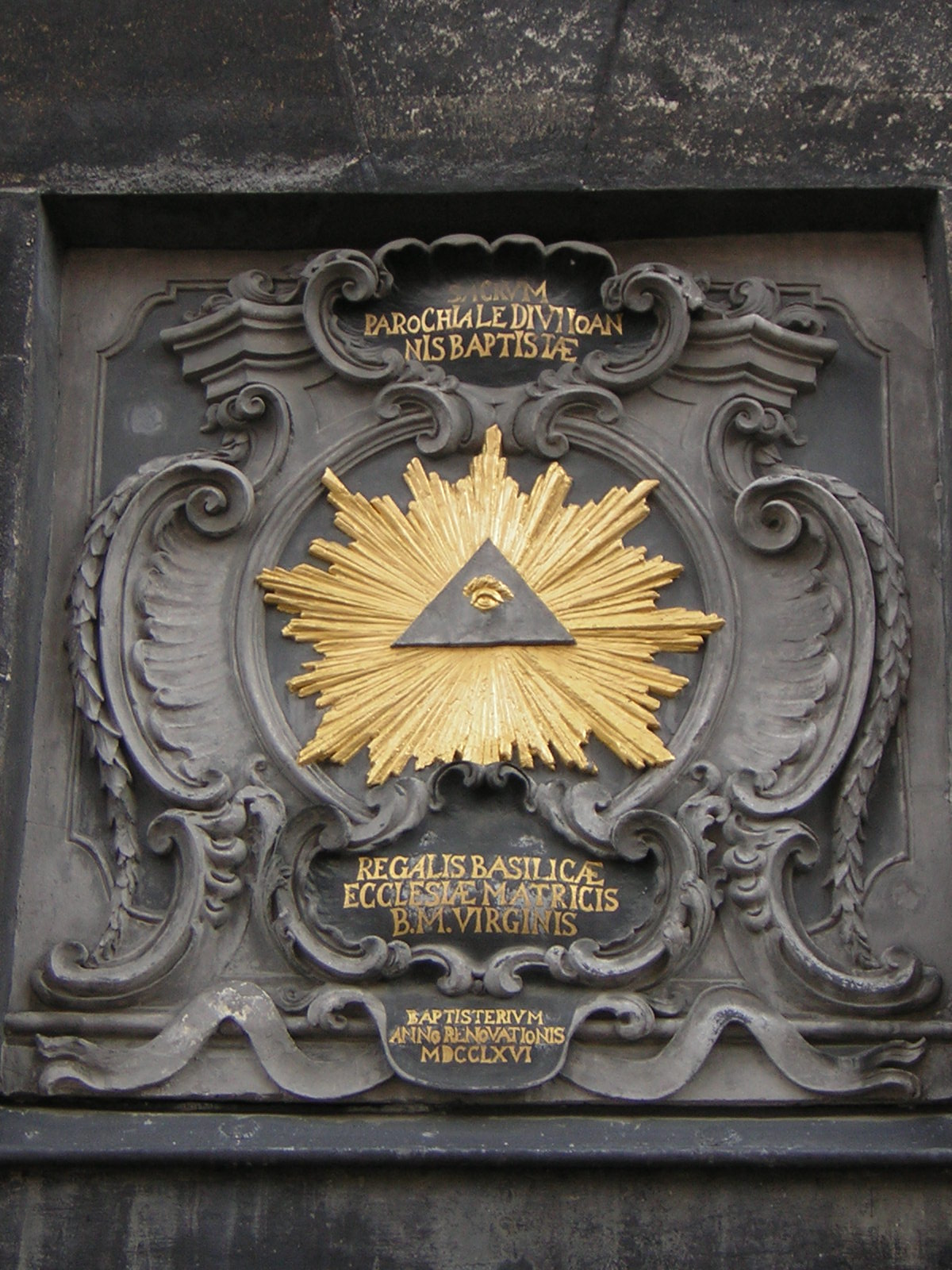 Beschreibung: Auge der Vorsehung am Aachener Dom in Aachen Fotograf: Trexer Aufgenommen: 2005 mit Nikon Coolpix 2200